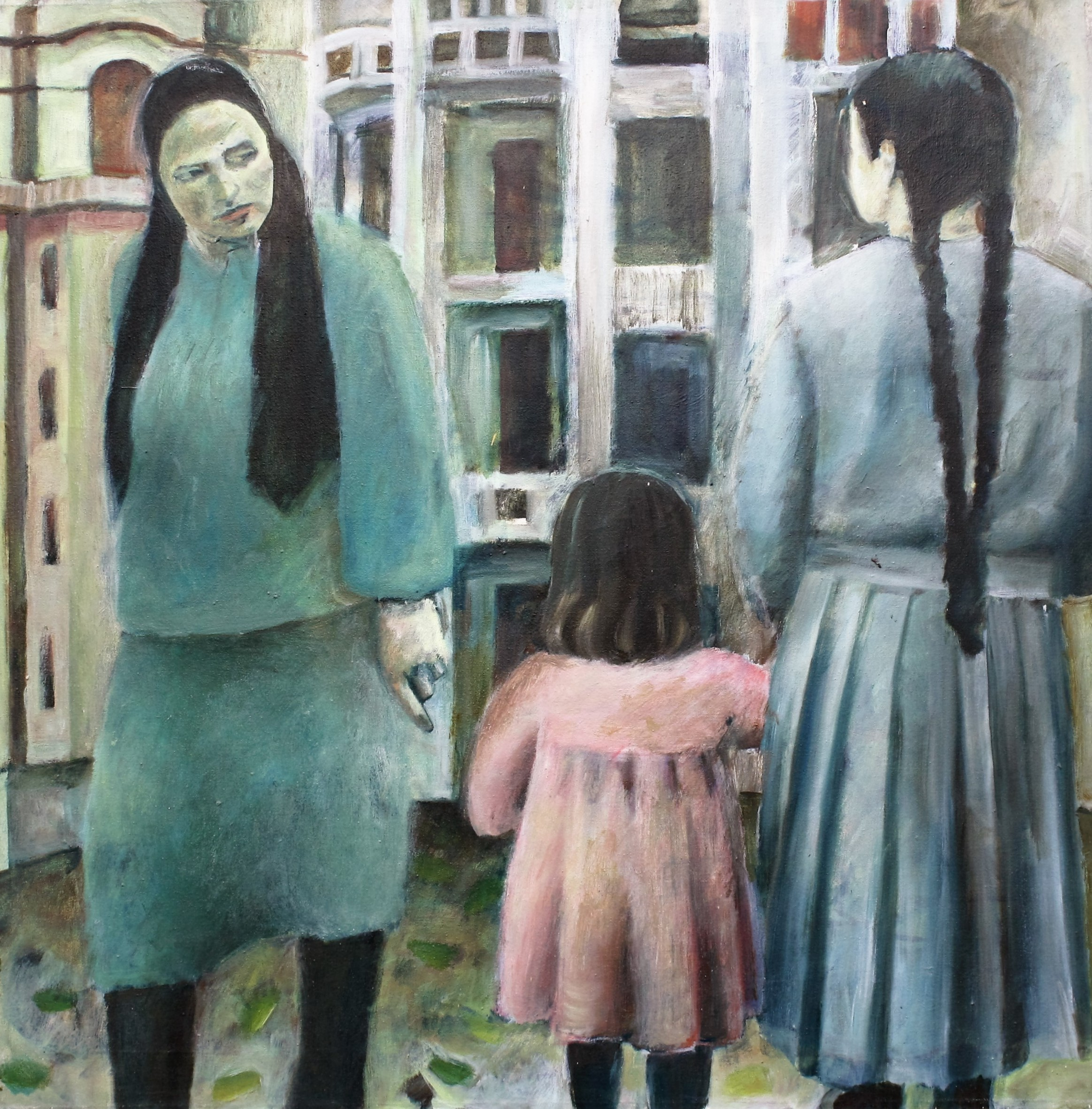 נעמי טנהאוזר - מבט